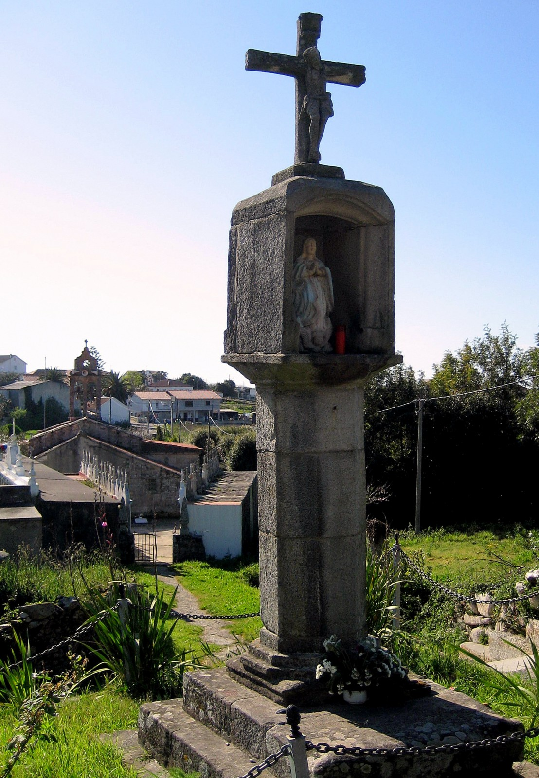 Cruceiro con capela, Cabráis, Ribasieira, Porto do Son